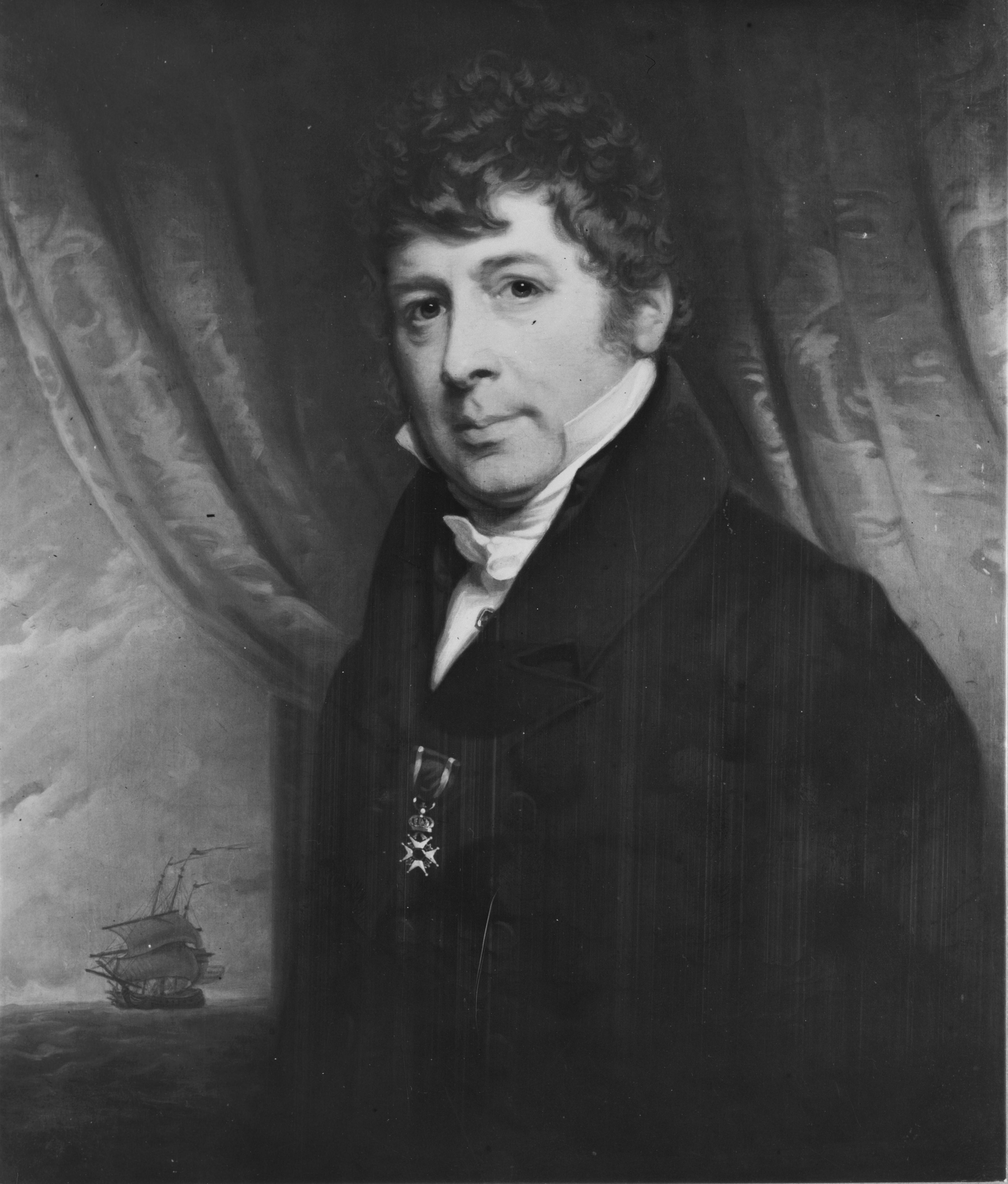 Portrait of Hendrik Doeff (1764 - 1837)